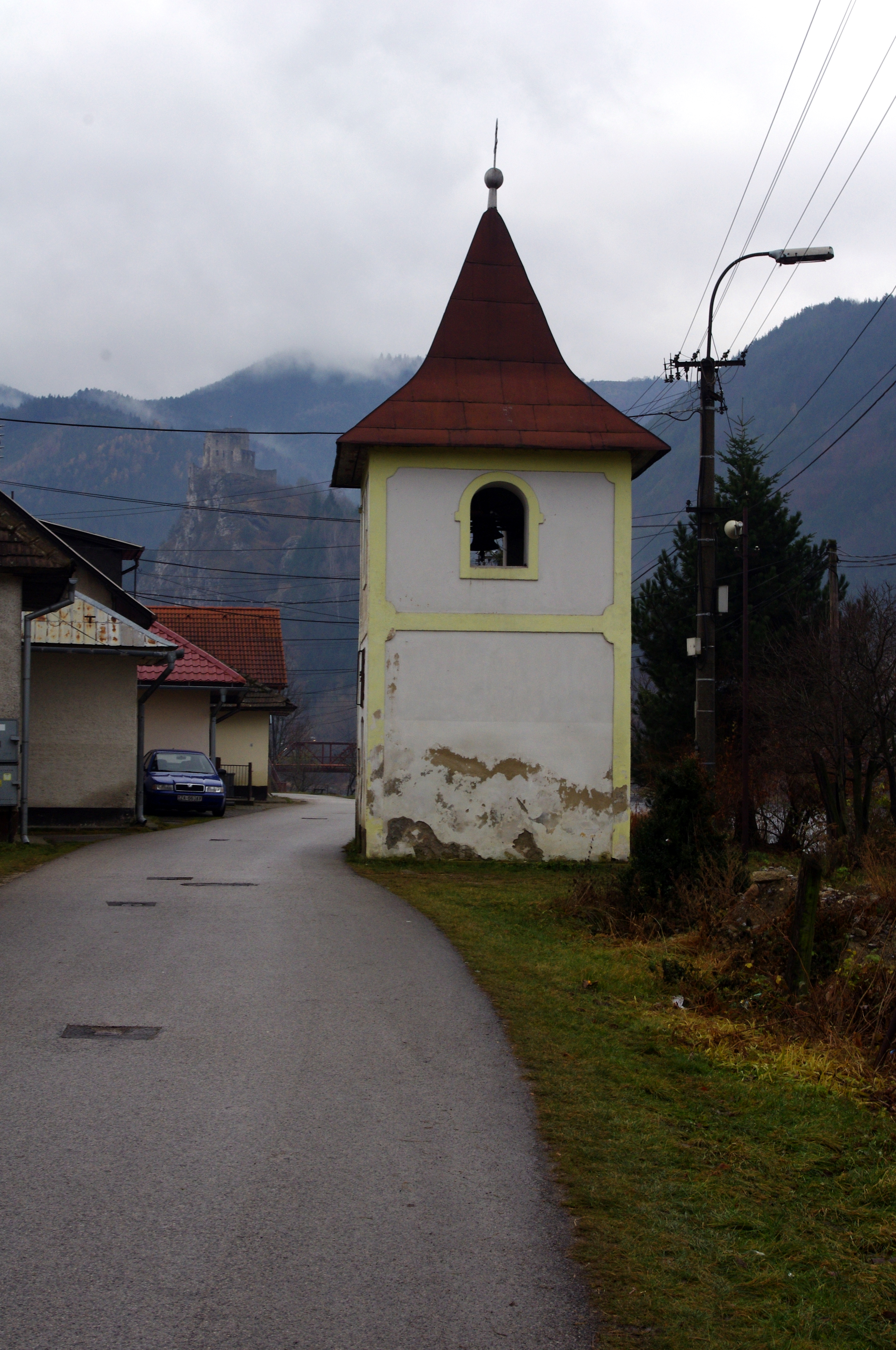 Nezbudská Lúčka 05.12.2011